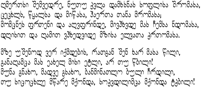 Beispiel für georgische Schrift